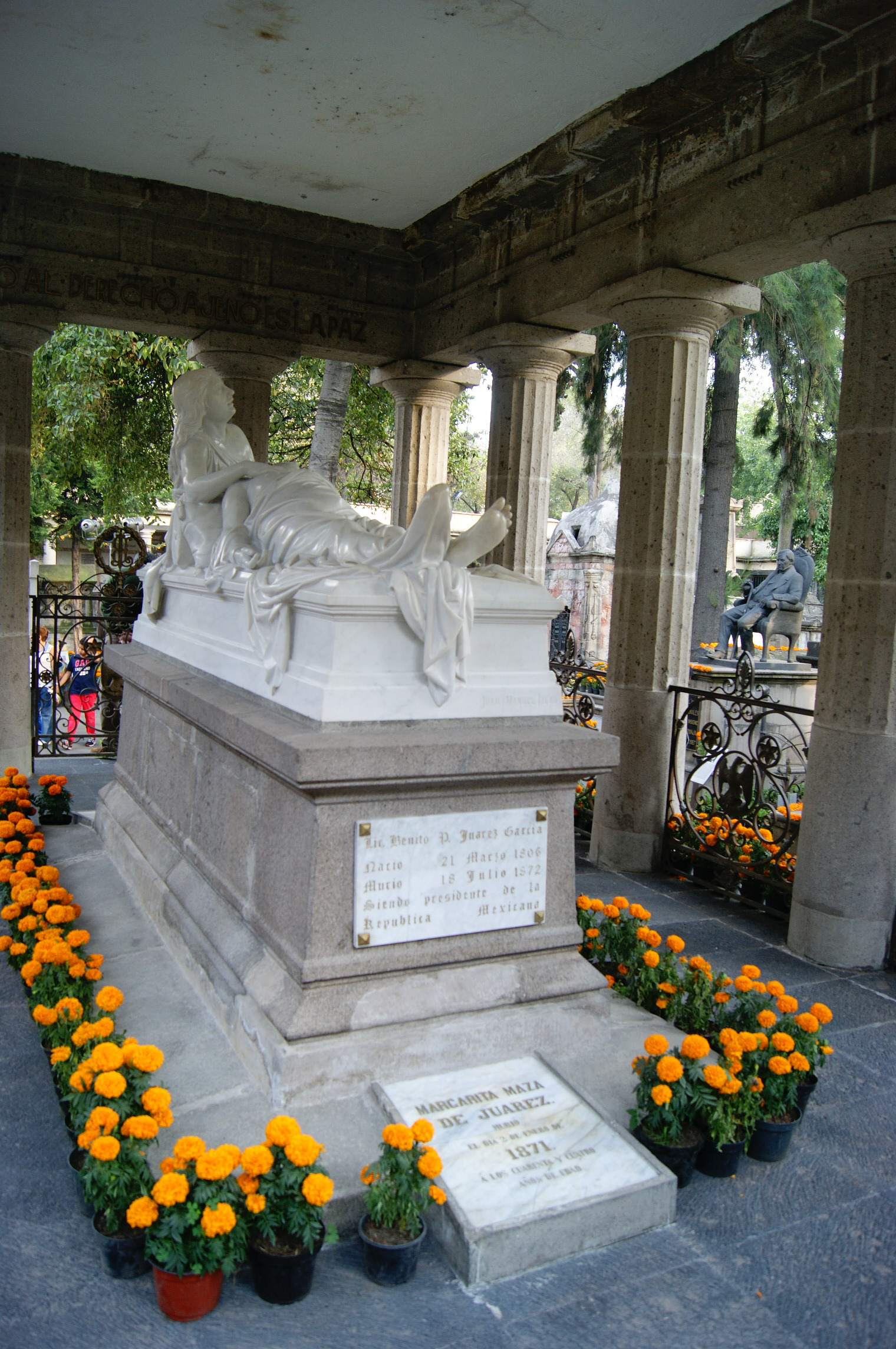 Panteón de San Fernando en día de muertos. Mausoleo de Lic. Benito Juárez García